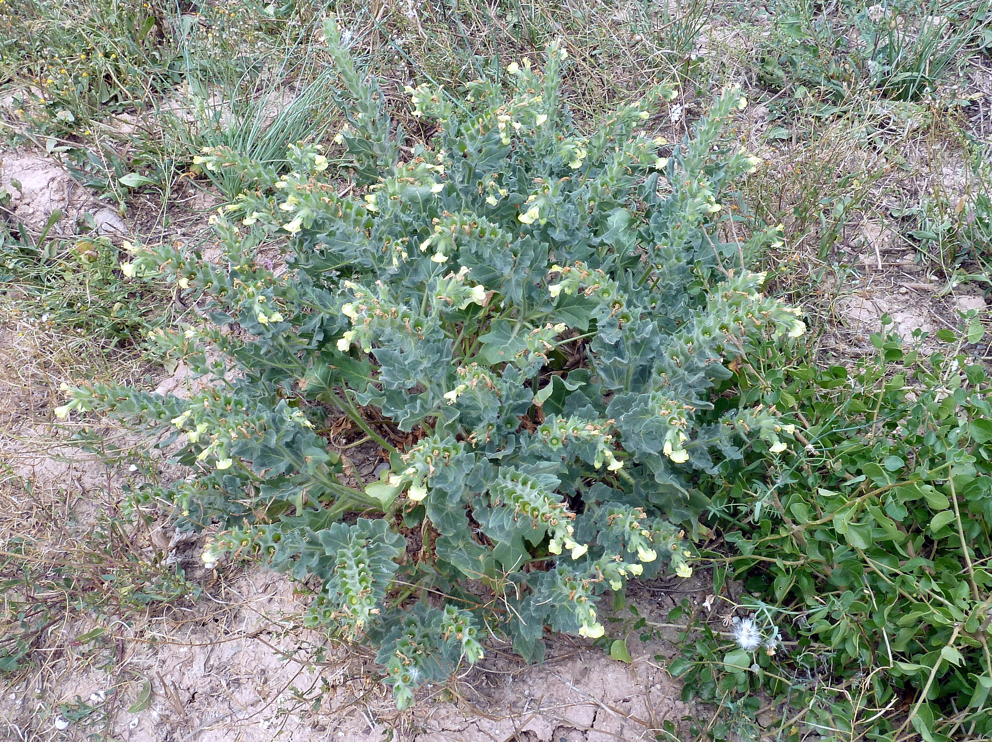 Hyoscyamus albus (Beleño blanco) : vista general - Camino viejo/Cañada de Alicante, Albatera (Provincia de Alicante, España).